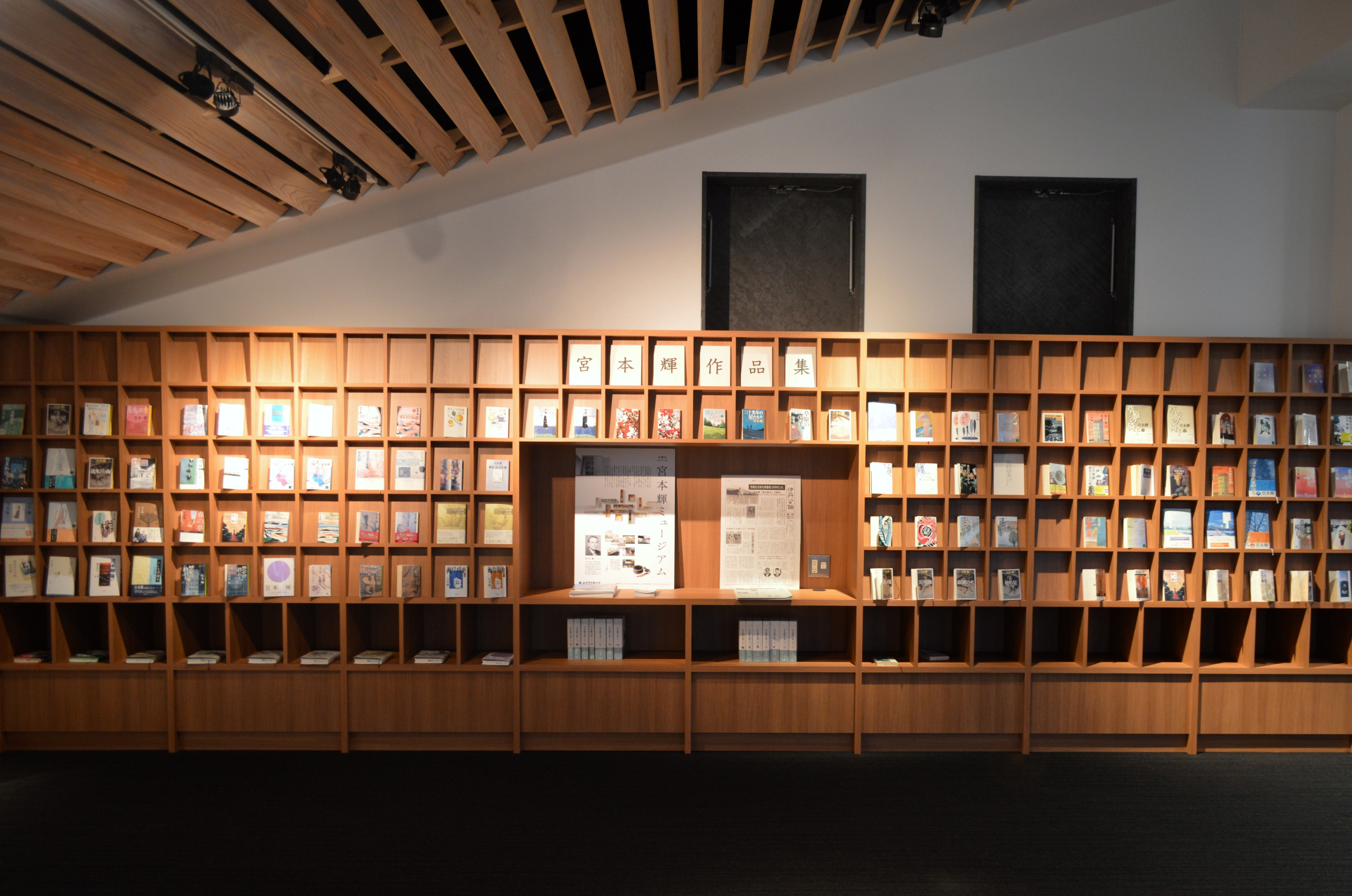 伊丹市立図書館「ことば蔵」。田辺聖子と宮本輝の著書を展示している「伊丹作家コーナー」。